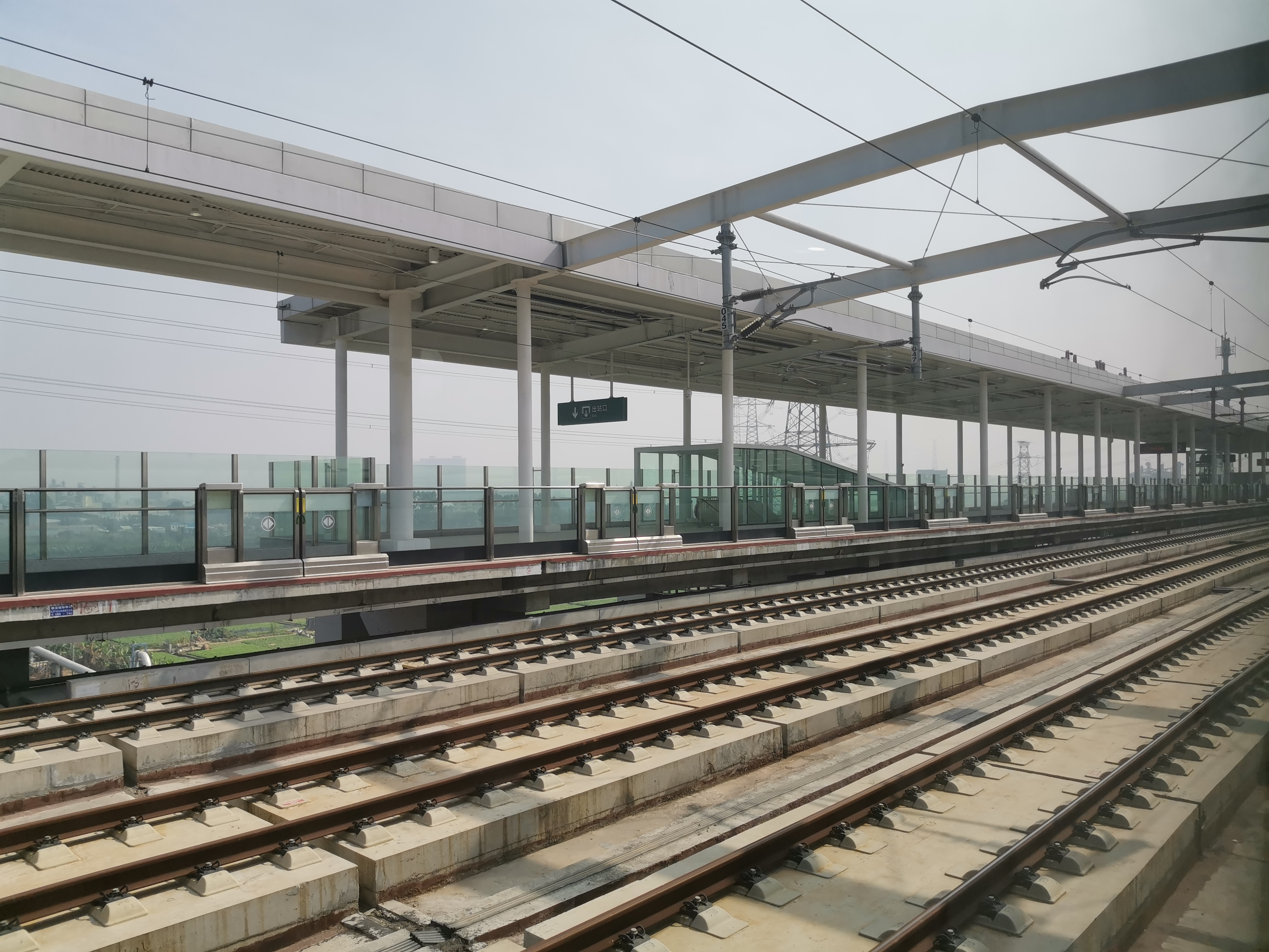 中堂站股道及往深圳机场方向月台